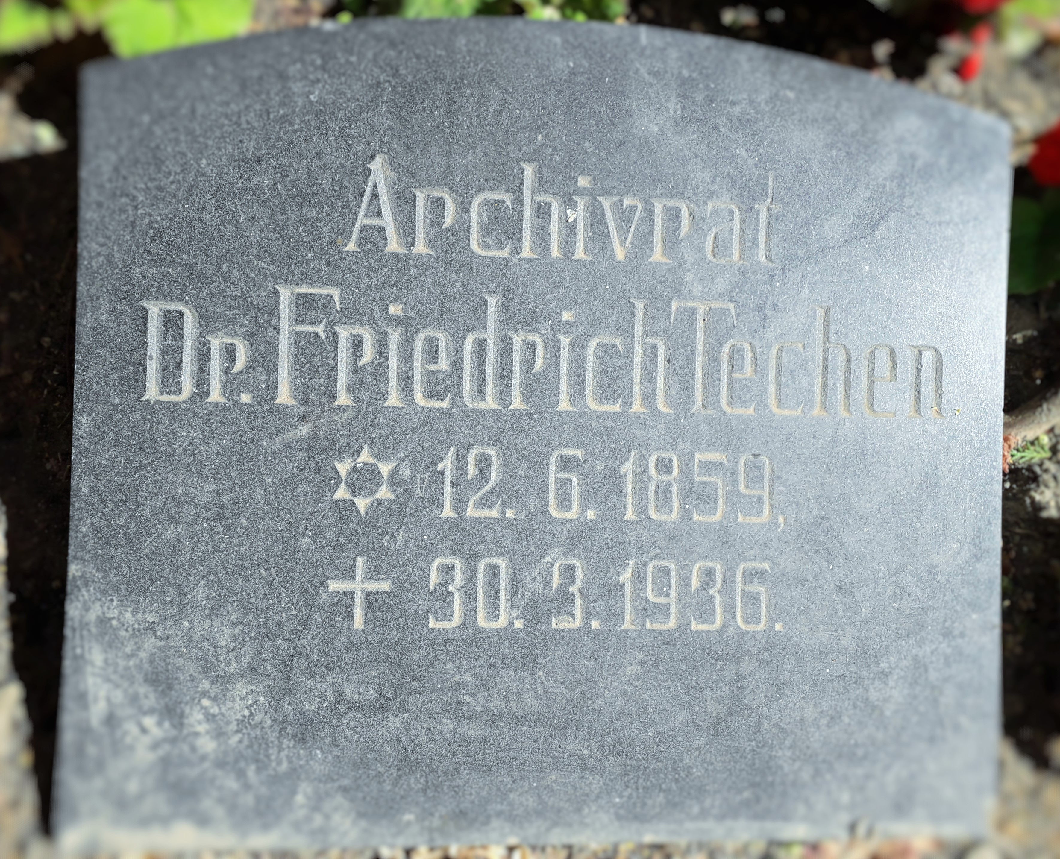 Grabplatte von Friedrich Techen (1859 - 1936) auf dem Stadtfriedhof der Hansestadt Wismar.